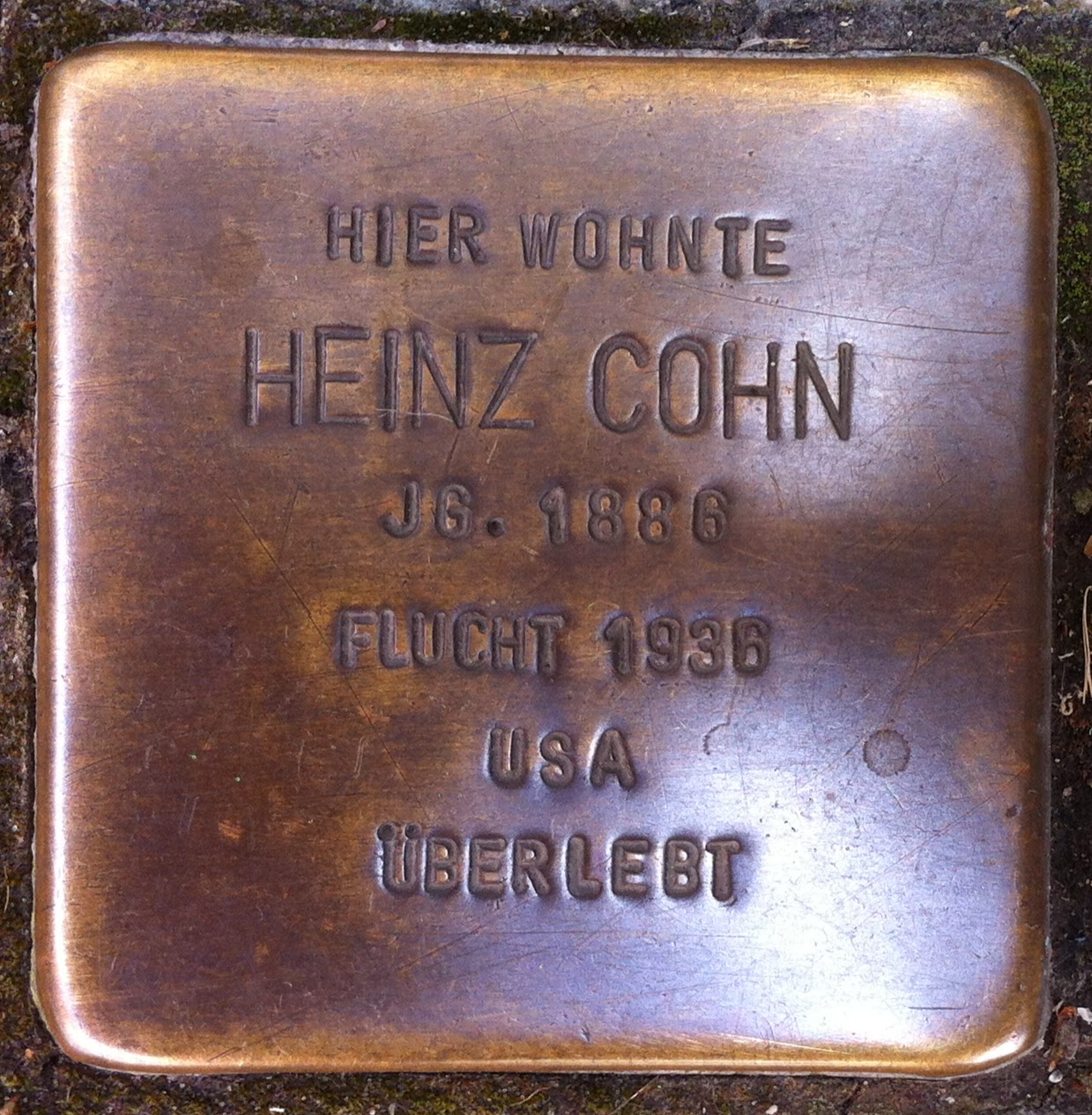 Deutschland (D) - Baden-Württemberg (BW) - Landkreis Konstanz (KN) - Stockach: Stolperstein "Heinz Cohn"